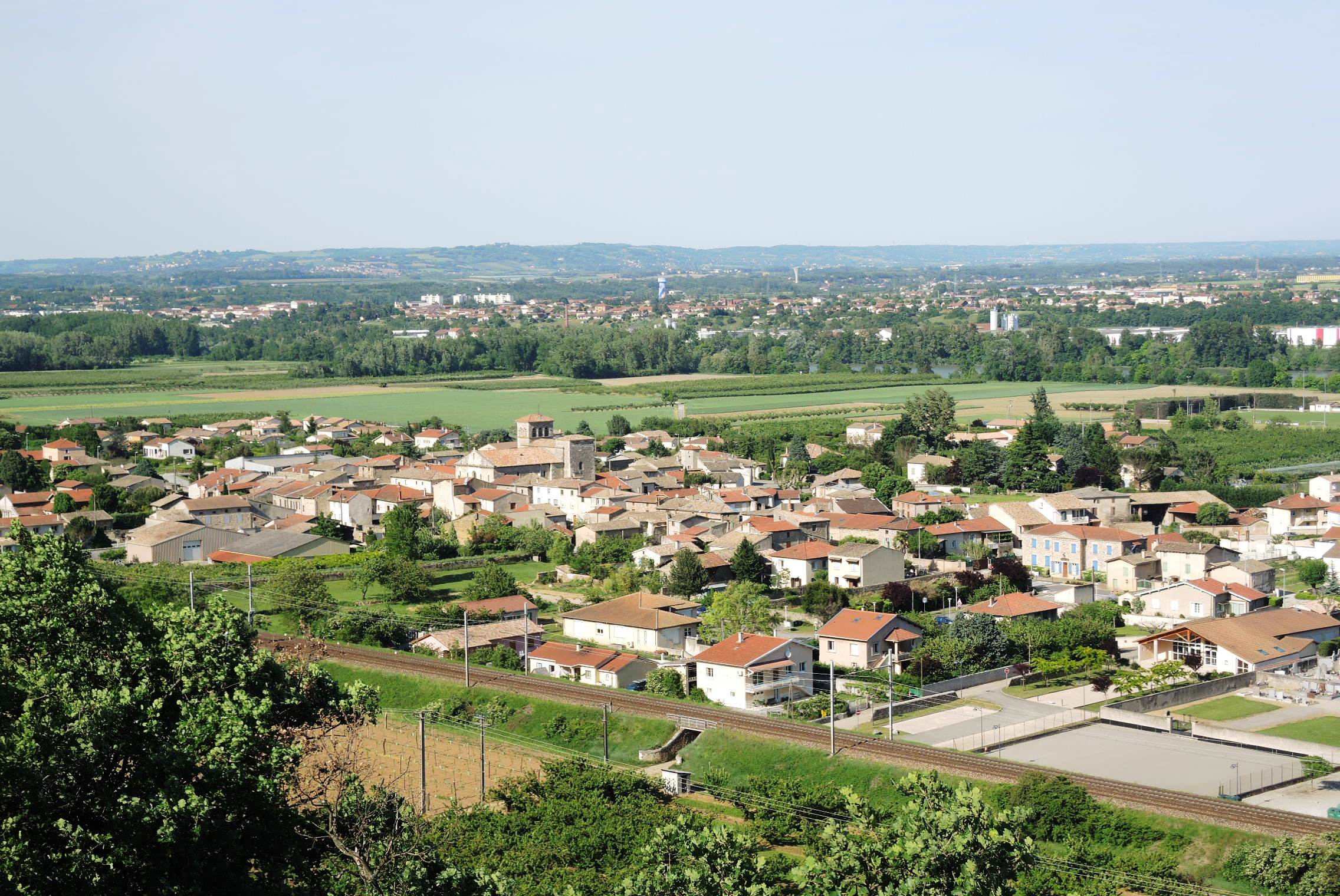 Champagne (Ardèche) détail